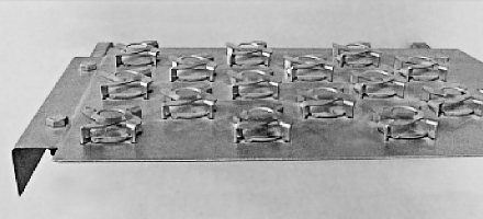 Ventilboden mit Deckelventilen für industrielle Rektifikationsanlagen